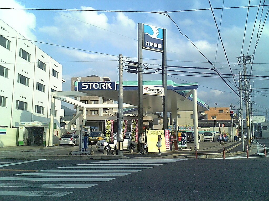 九州石油トータス周船寺SS（福岡市西区）